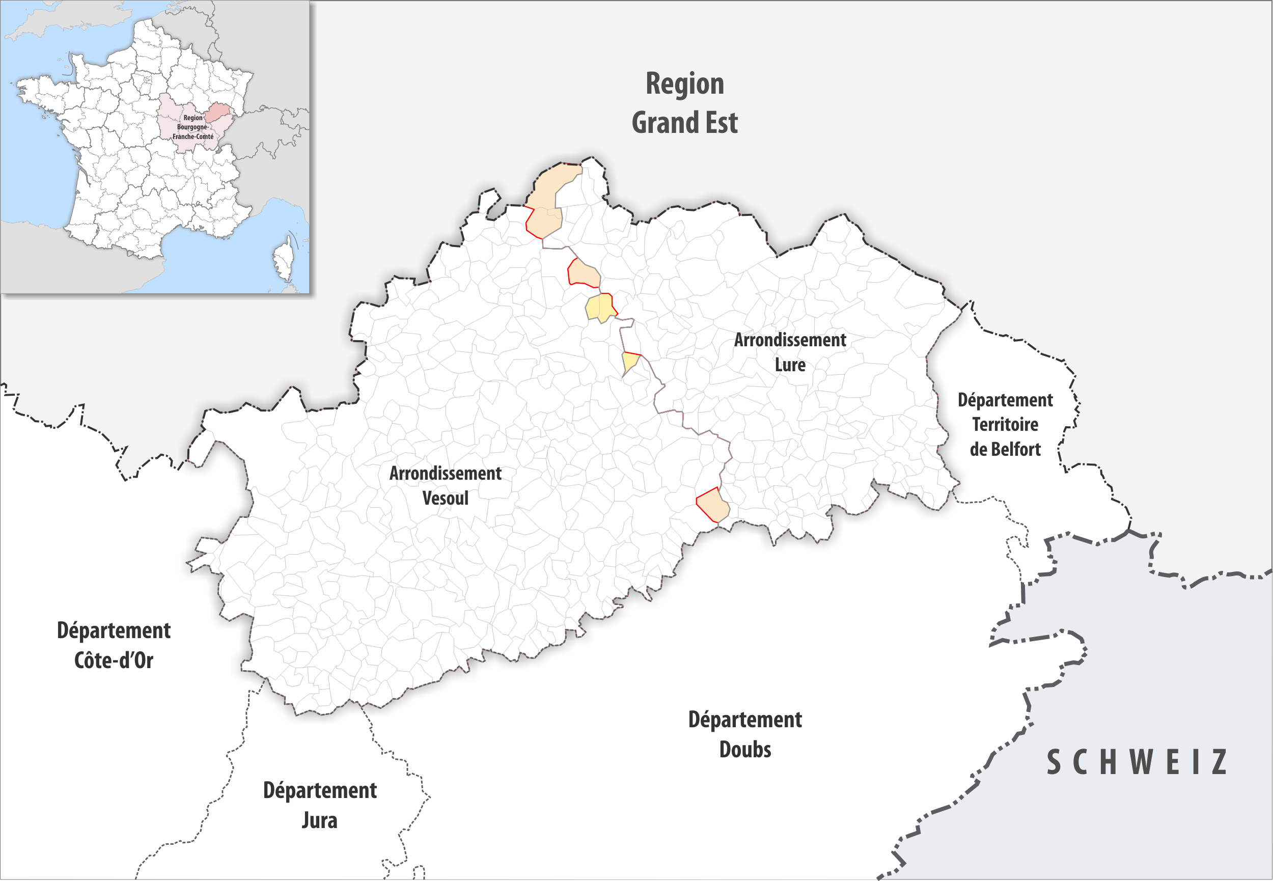 Arrondissements Anpassungen auf 2017 im Departement Haute-Saône